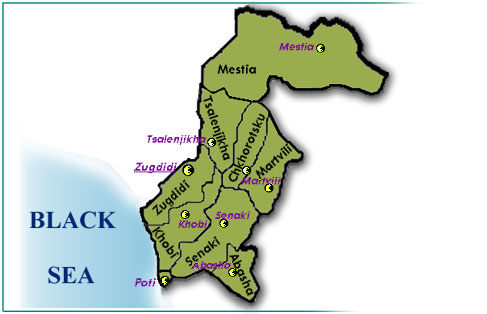 карта региона Самегрело Земо Сванети